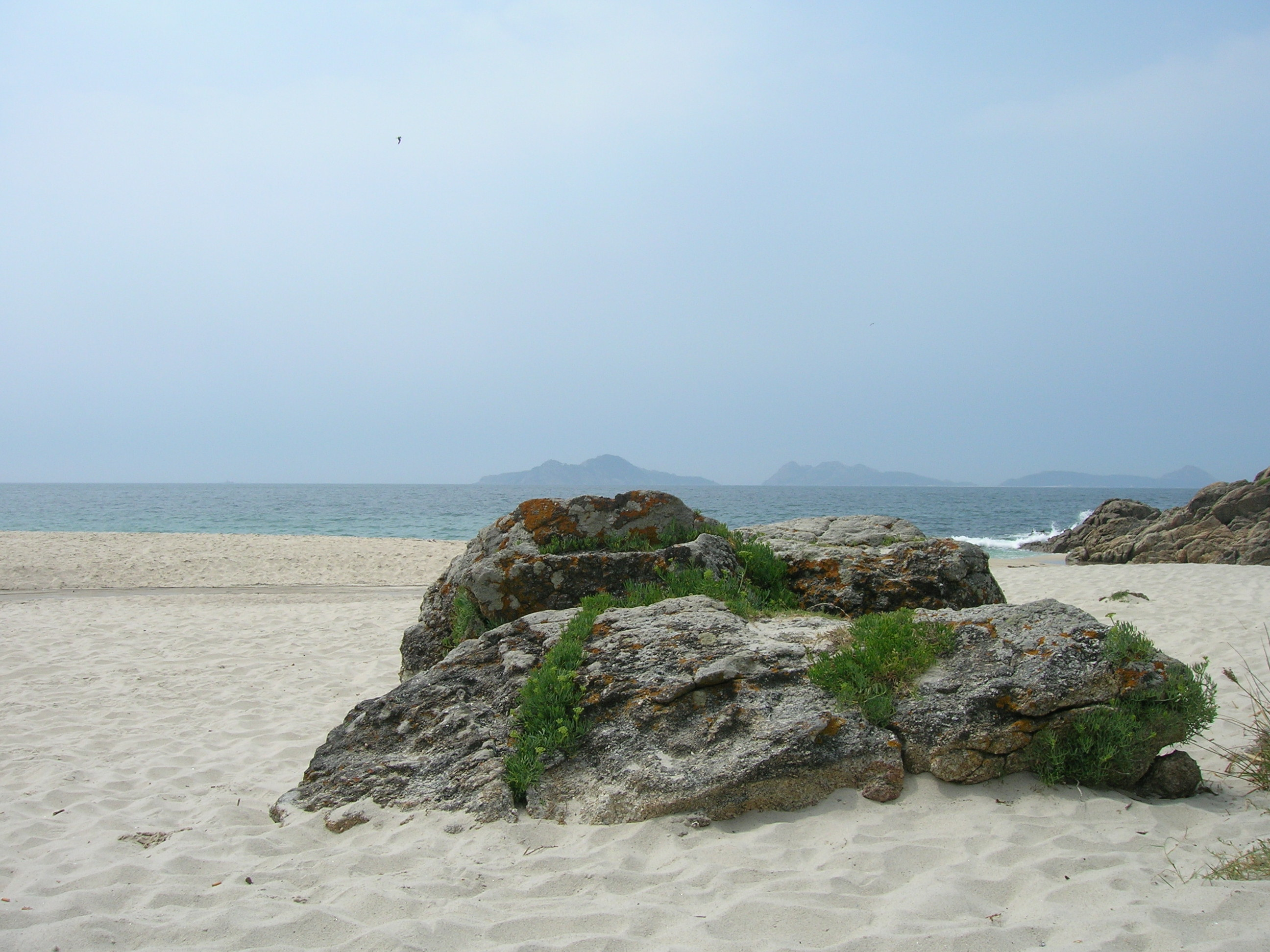 Esta playa es uno de los espacios del litoral más tranquilos, tanto para el que usa bañador como para el que prefiere tomar el sol desnudo. Quien busque discreción, la tiene garantizada. Los usuarios naturistas mantienen una relación armoniosa con los del otro bando. Es así porque el arenal parece perfectamente dividido en dos zonas correspondientes a ambas tendencias. El usuario de Fortiñón es habitual, conoce a la perfección la actividad que allí se practica y en ningún caso pone trabas al desnudo sino más bien todo lo contrario. Fuente: La Voz de Galicia. Esta foto participó en el juego En otro lugar de Flickr .